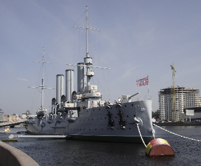 Le croiseur Aurore qui donna le signal de la Révolution d'octobre